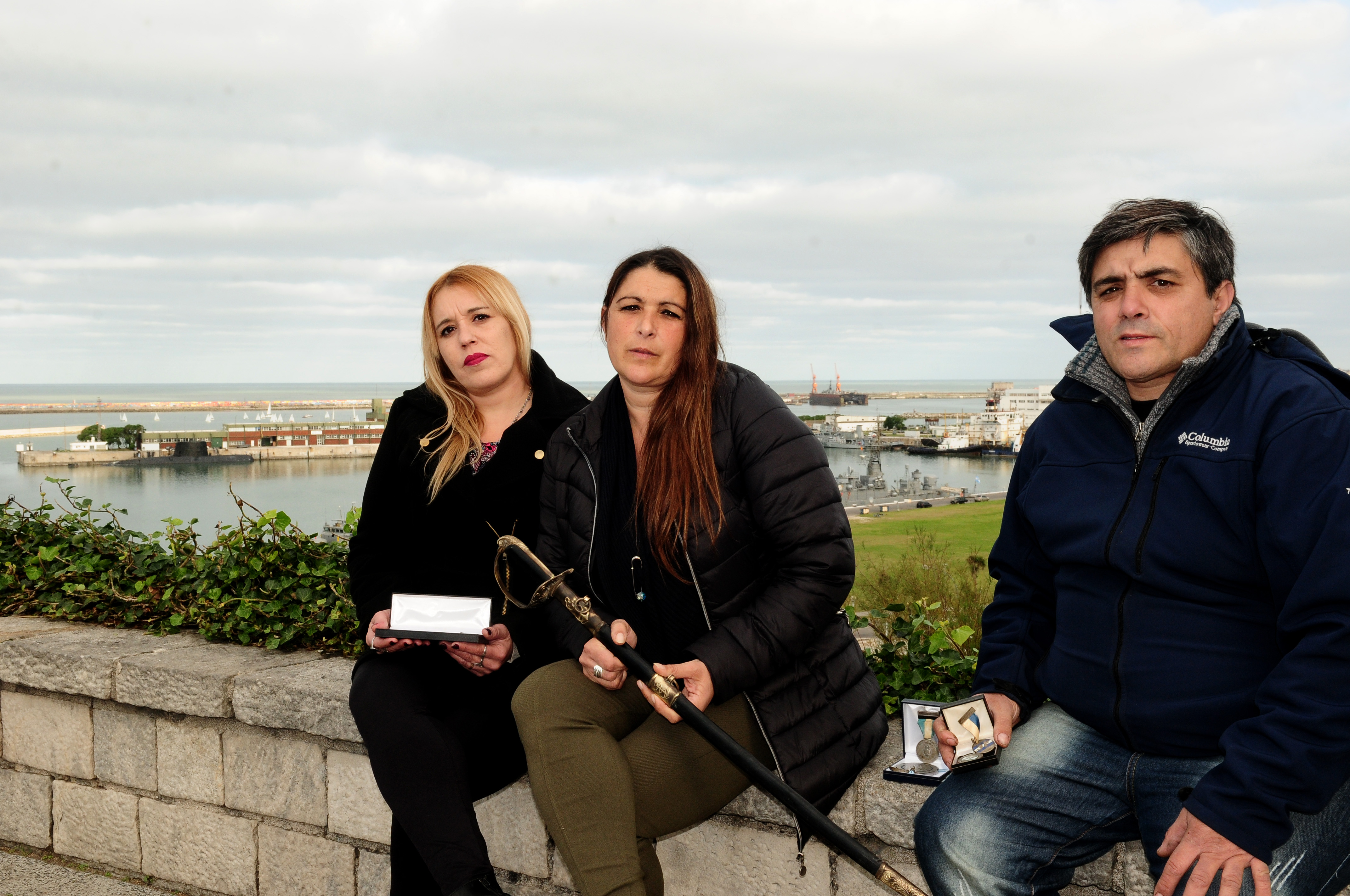 Mar del Plata 29-5-17 Cristian, Carolina y Karina posaron y mostraron los tesoros y fotos de su padre, Félix Artuso asesinado en el submarino Santa Fe en las Georgias del Sur. Atras de ellos la Base de submarinos de Mar del Plata, Prov. de Buenos Aires (Argentina) Foto: Fabián Gastiarena